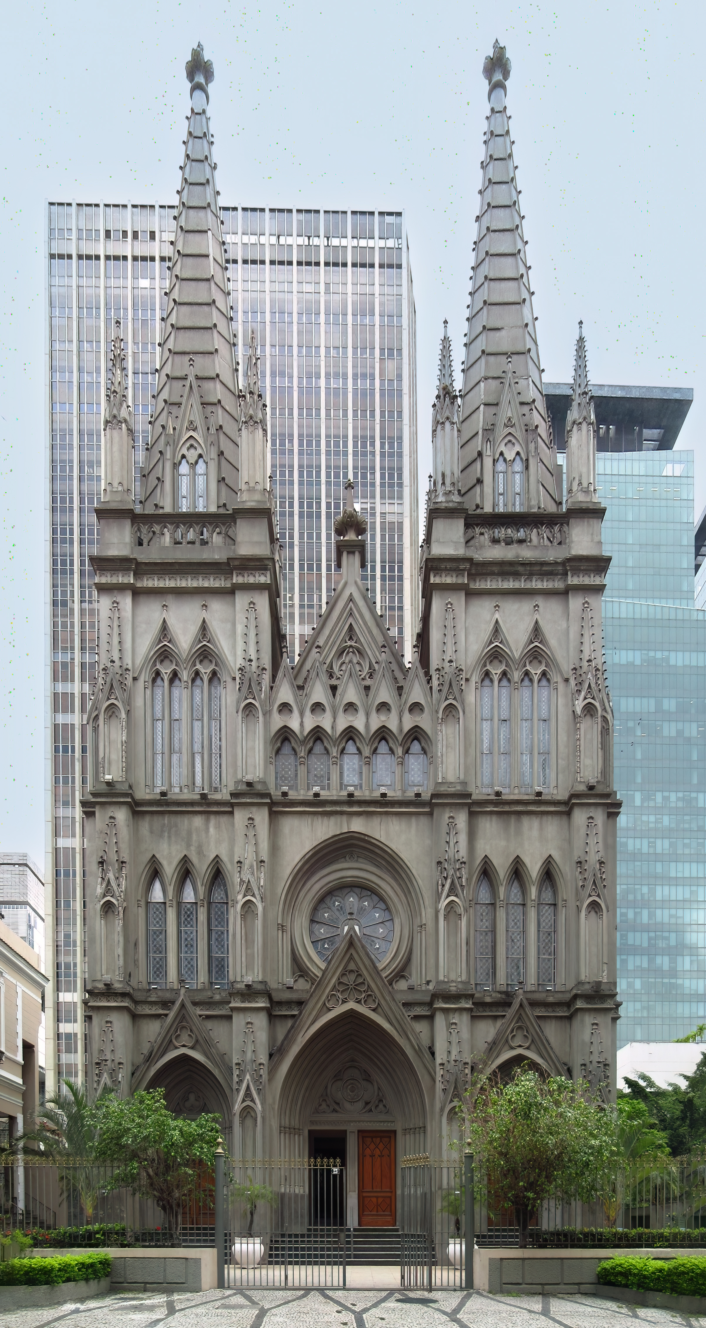 La iglesia Presbiteriana de Río de Janeiro, también conocida como la catedral Presbiteriana de Río de Janeiro, es una iglesia protestante reformada,​ de orientación calvinista presbiteriana, que depende de la Iglesia Presbiteriana de Brasil. Se encuentra en el barrio Centro de la Zona Central de Río de Janeiro, a pocos pasos de la plaza Tiradentes. Fue construida en 1862 y es de estilo neogótico.